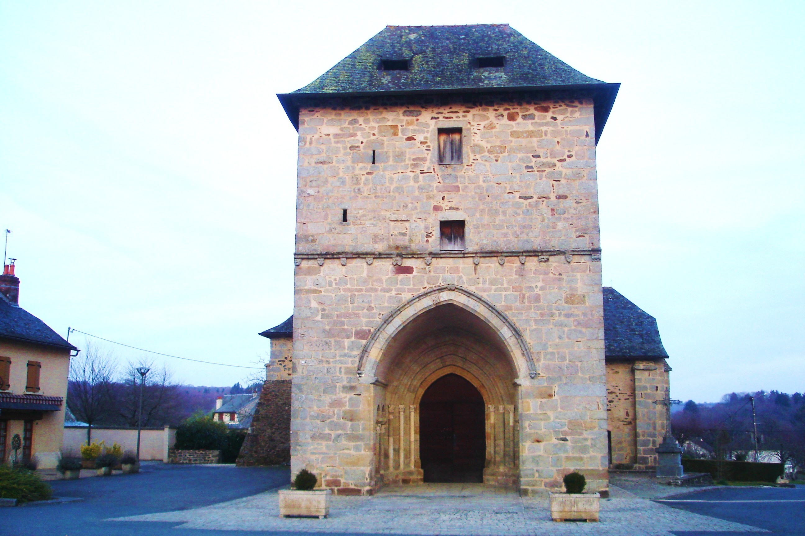 Église de LaGraulière - Corrèze - France